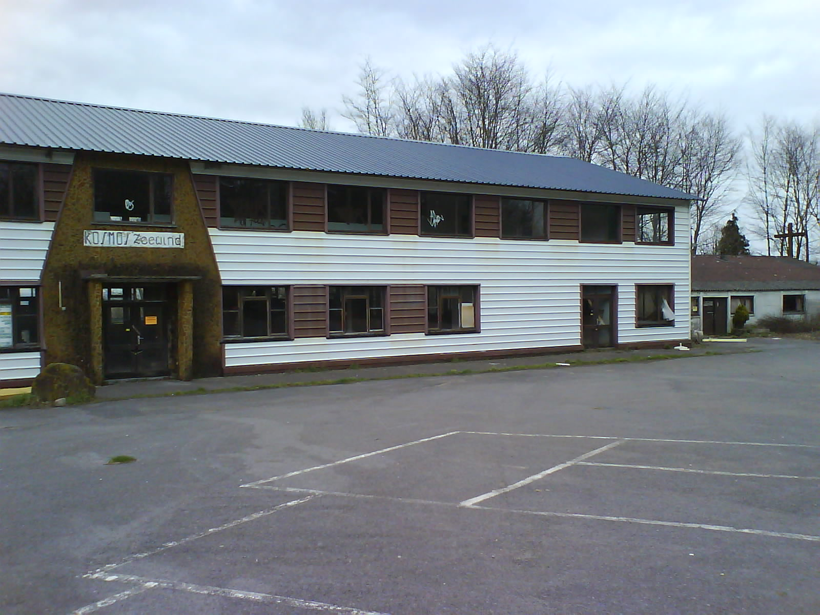 Home Zeewind, met slaapzalen en polyvalente zalen.